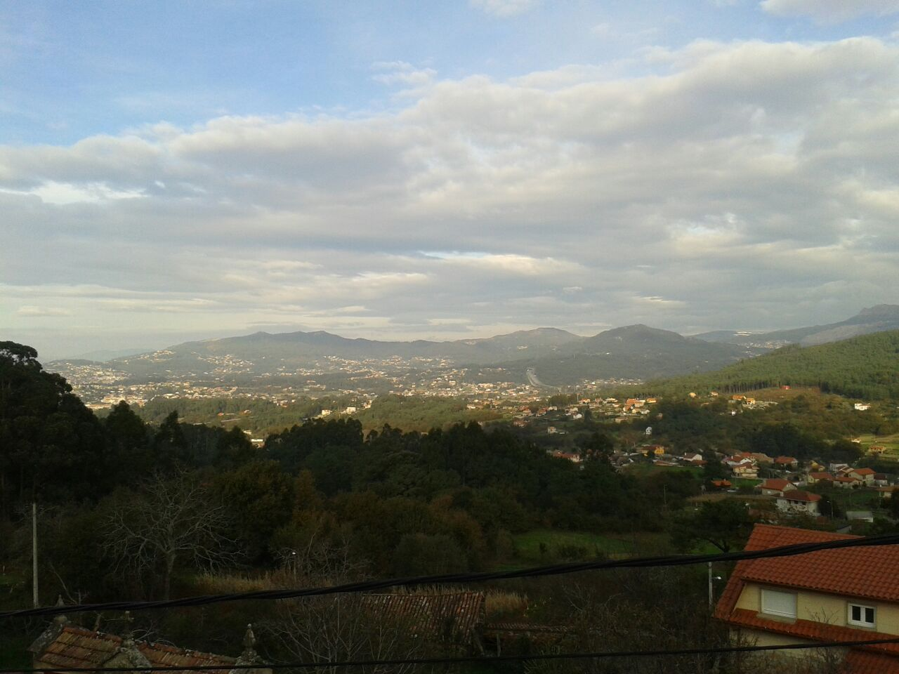 Imagen del paisaje de Belesar.